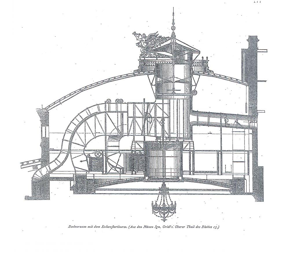 Belüftungsystem des Burgtheaters, Wien